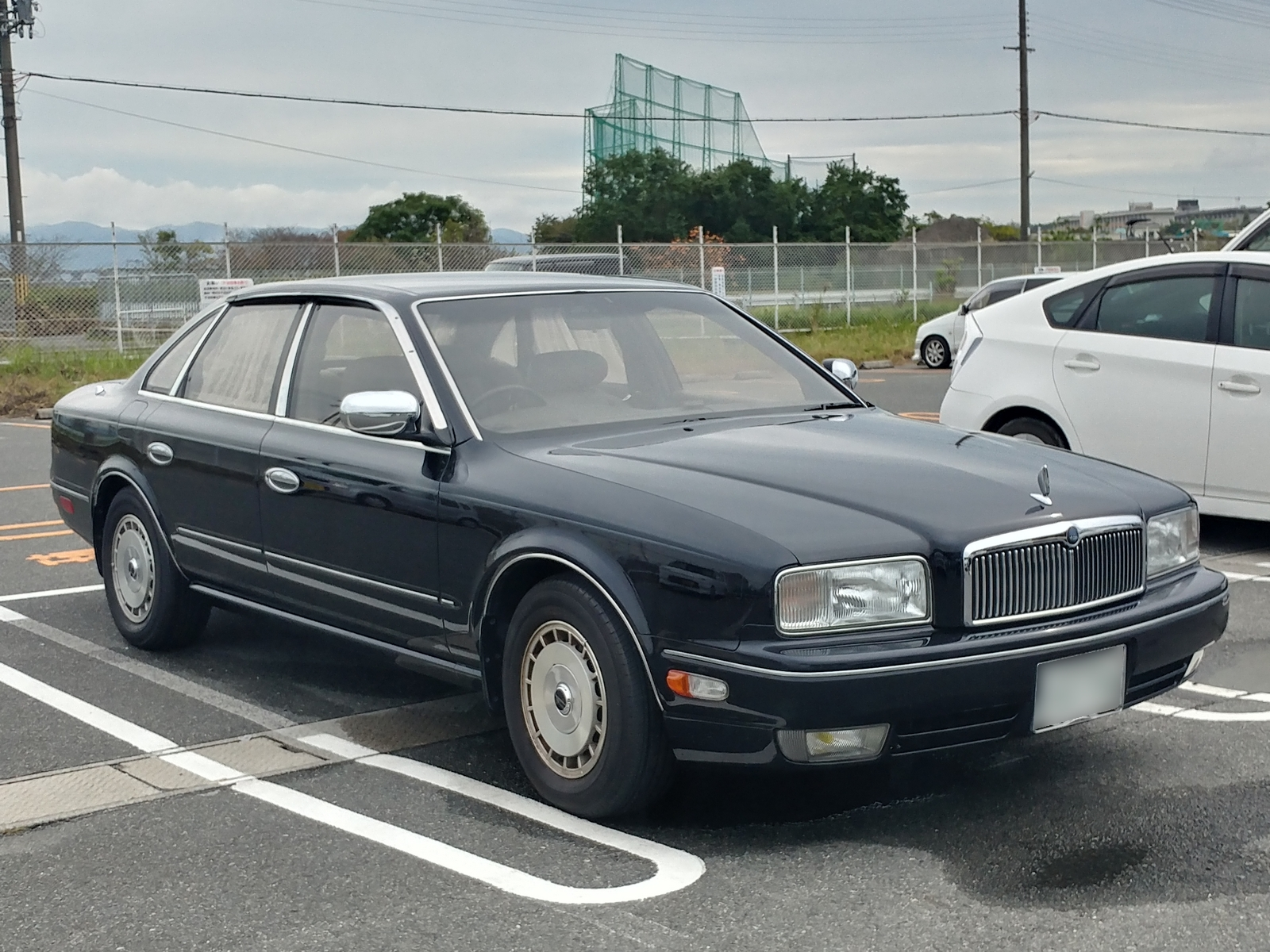 プレジデントJS タイプL（中期型）